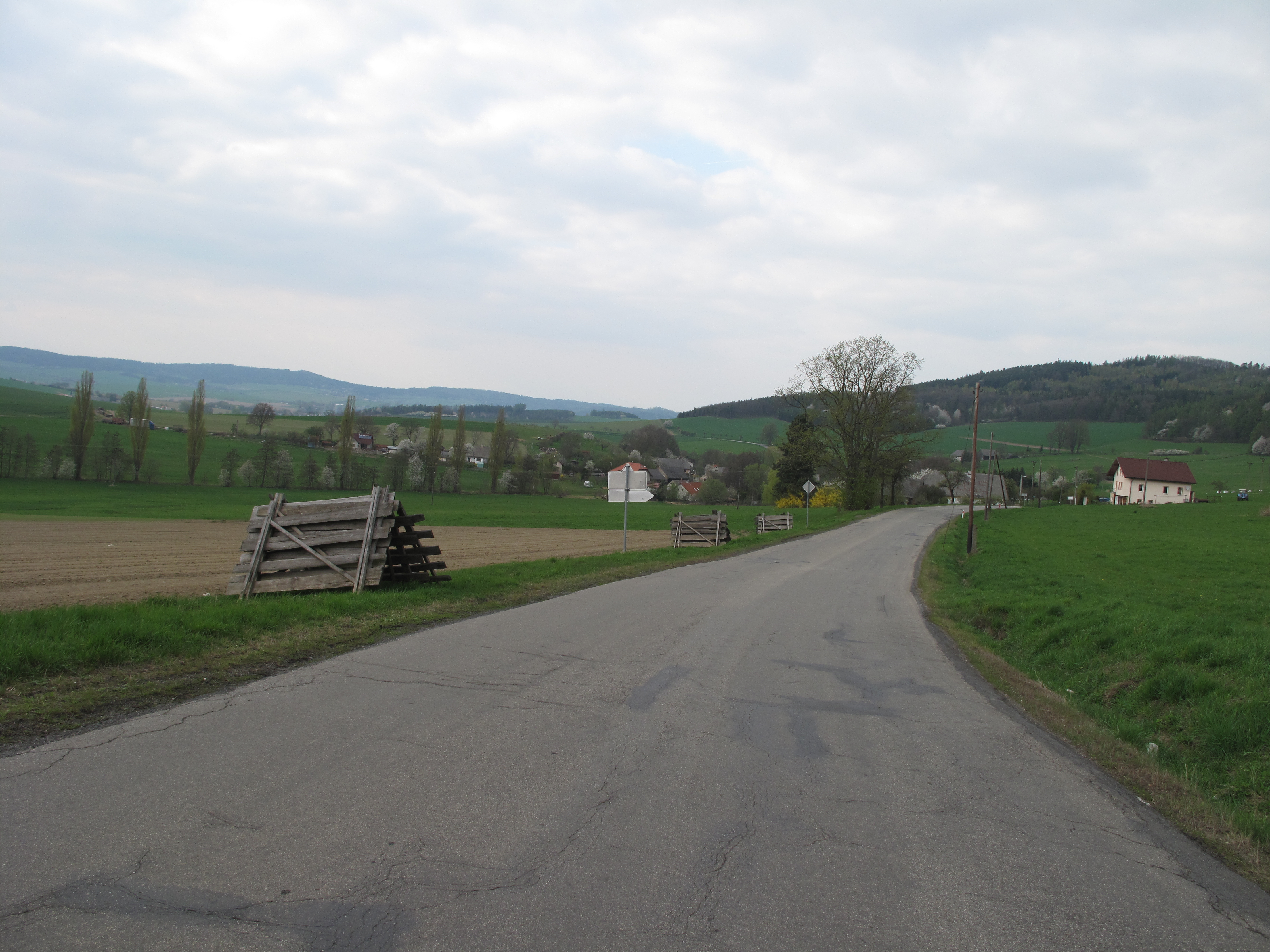 Buková (Dlažov). Okres Klatovy, Česká republika.